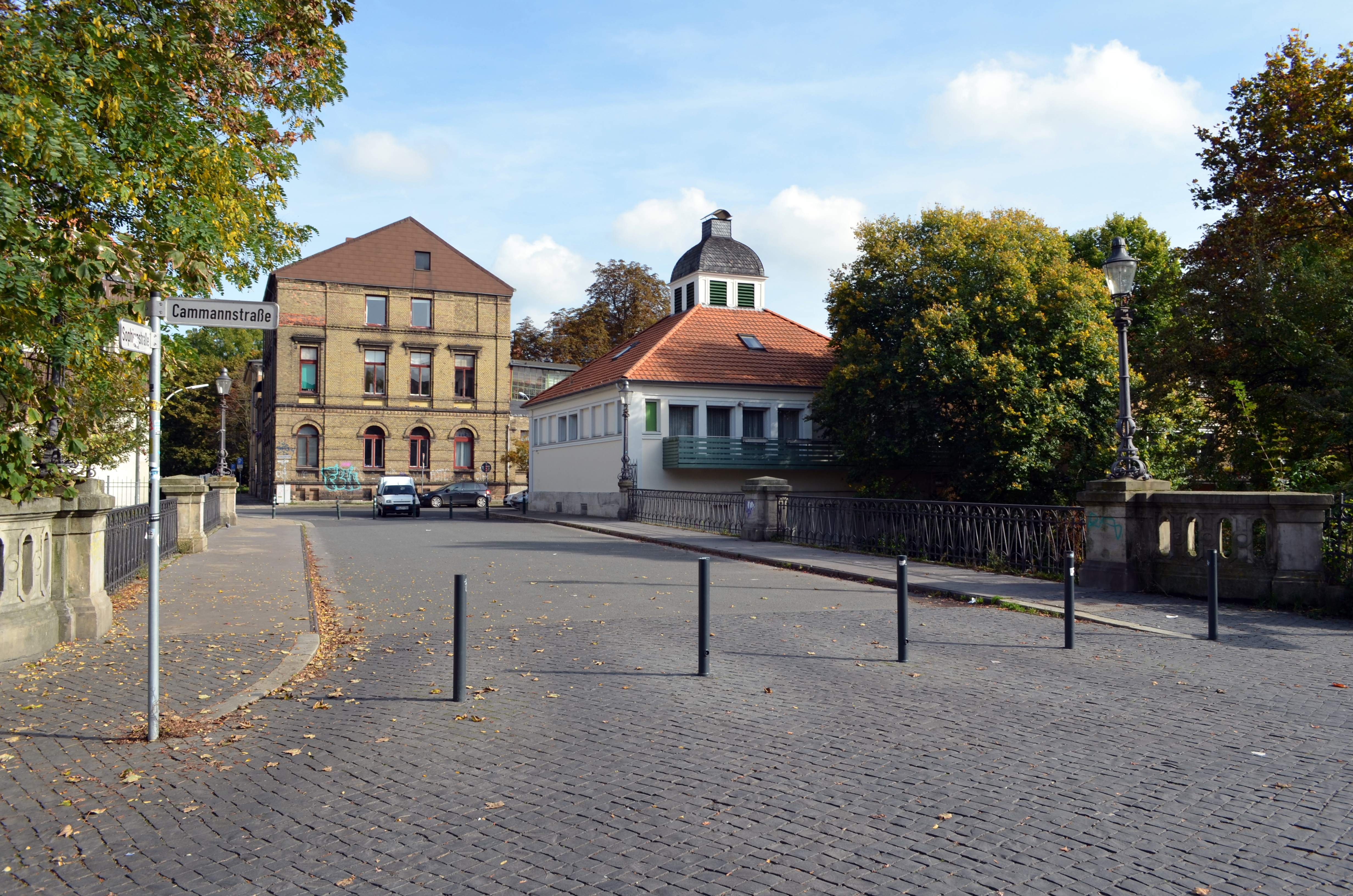 Braunschweig: Volksbrausebad Ferdinandstraße (helles Gebäude rechts), links daneben, etwas im Hintergrund, das Haus Ferdinandstraße 9, ehemaliges Judenhaus von der Kreuzung Cammannstraße/Sophienstraße über die Ferdinandbrücke hinweg gesehen.